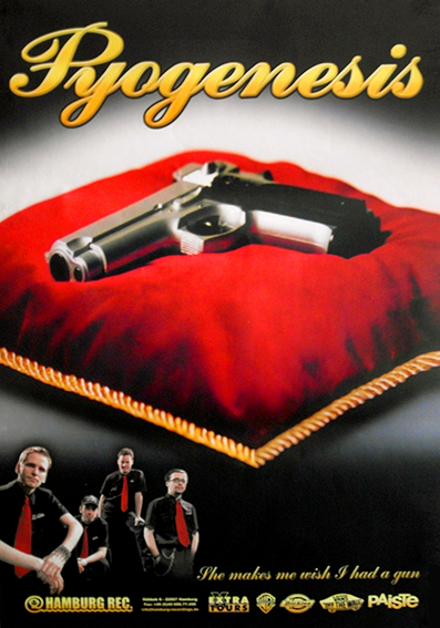 Pyogenesis Poster "She makes me wish.."